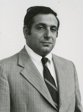 Michael Baroody